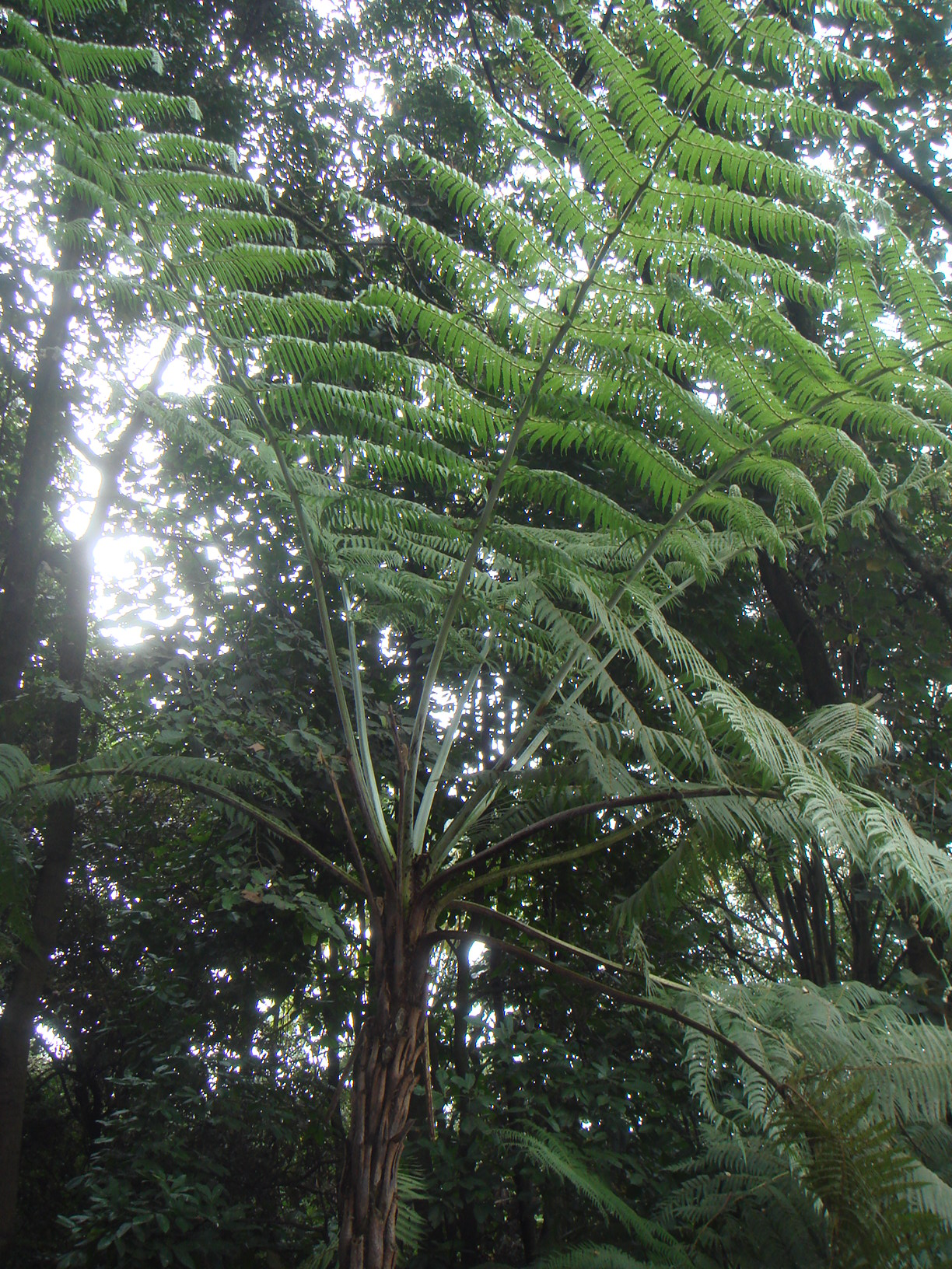 Palma boba (Cyathea caracasana), Jardín Botánico Celestino Mutis, Bogotá, Colombia.